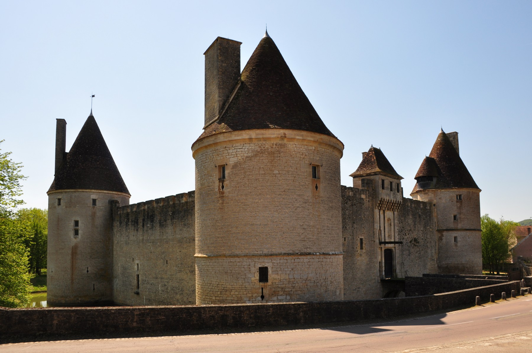 Schloss Posanges in Burgund, Nordost-Ansicht